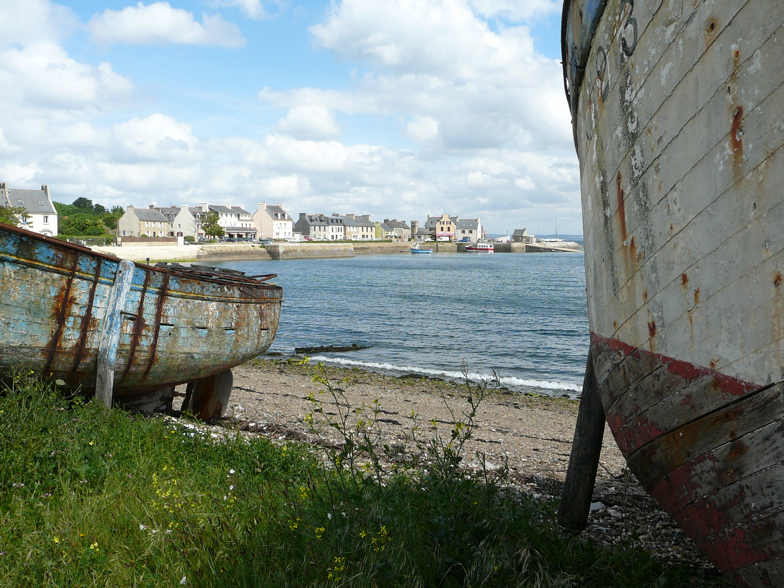 Presqu'île de Crozon : vieilles coques près du port du Fret